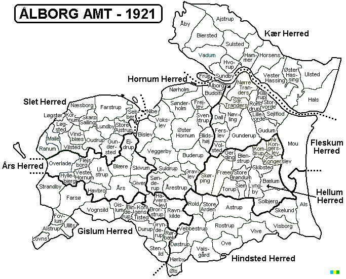 Map of Aalborg Amt 1921, Denmark.